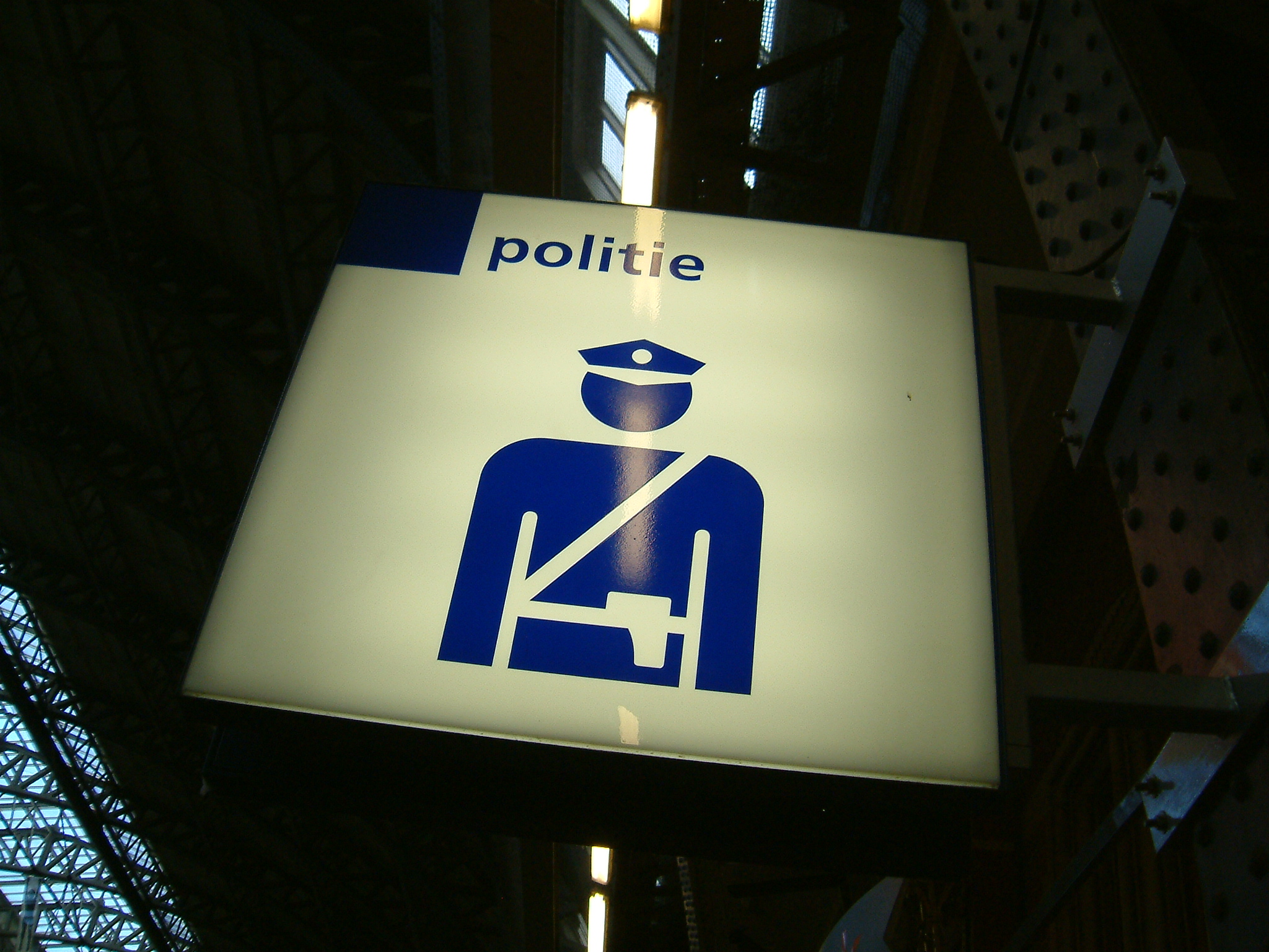 Stationslogo politie (internationaal)